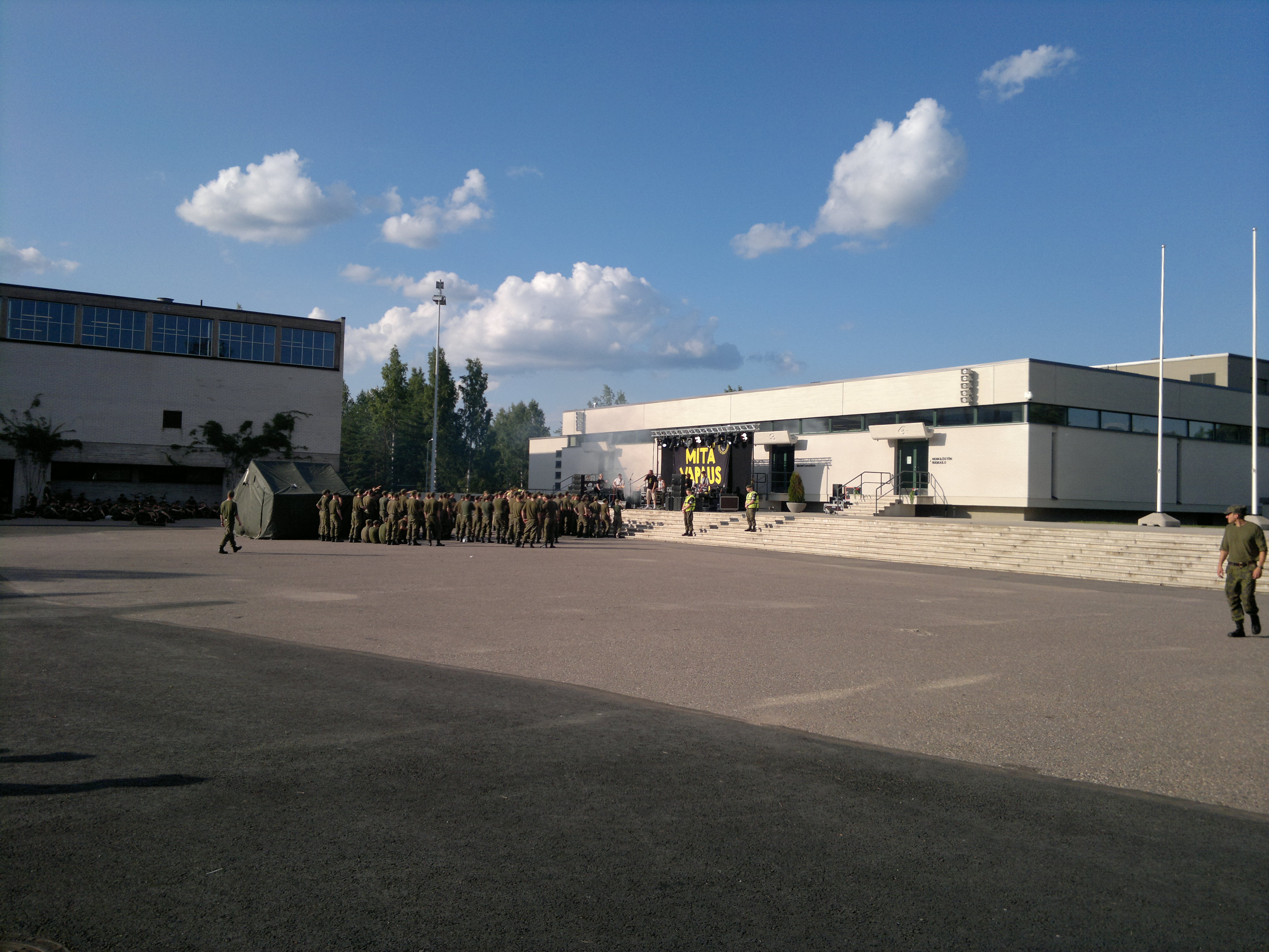 Paleface esiintymässä Porilaisaukiolla Porin prikaatissa Säkylässä.